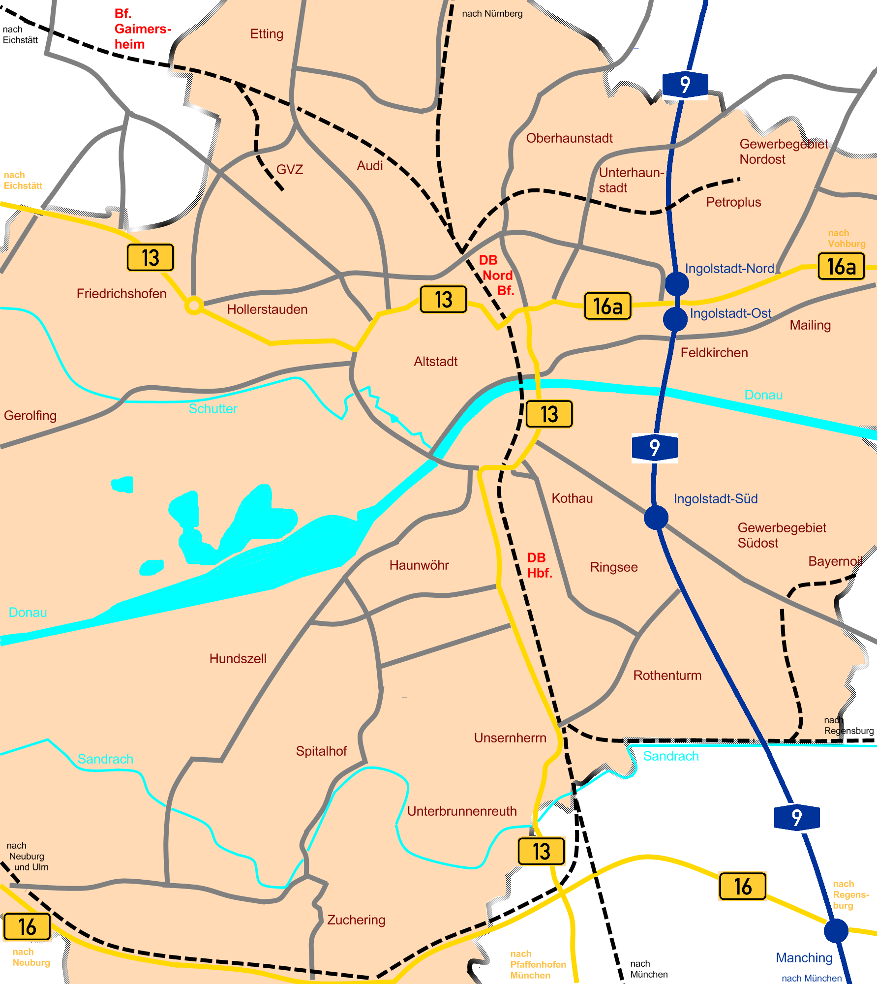 Infrastruktur von Ingolstadt